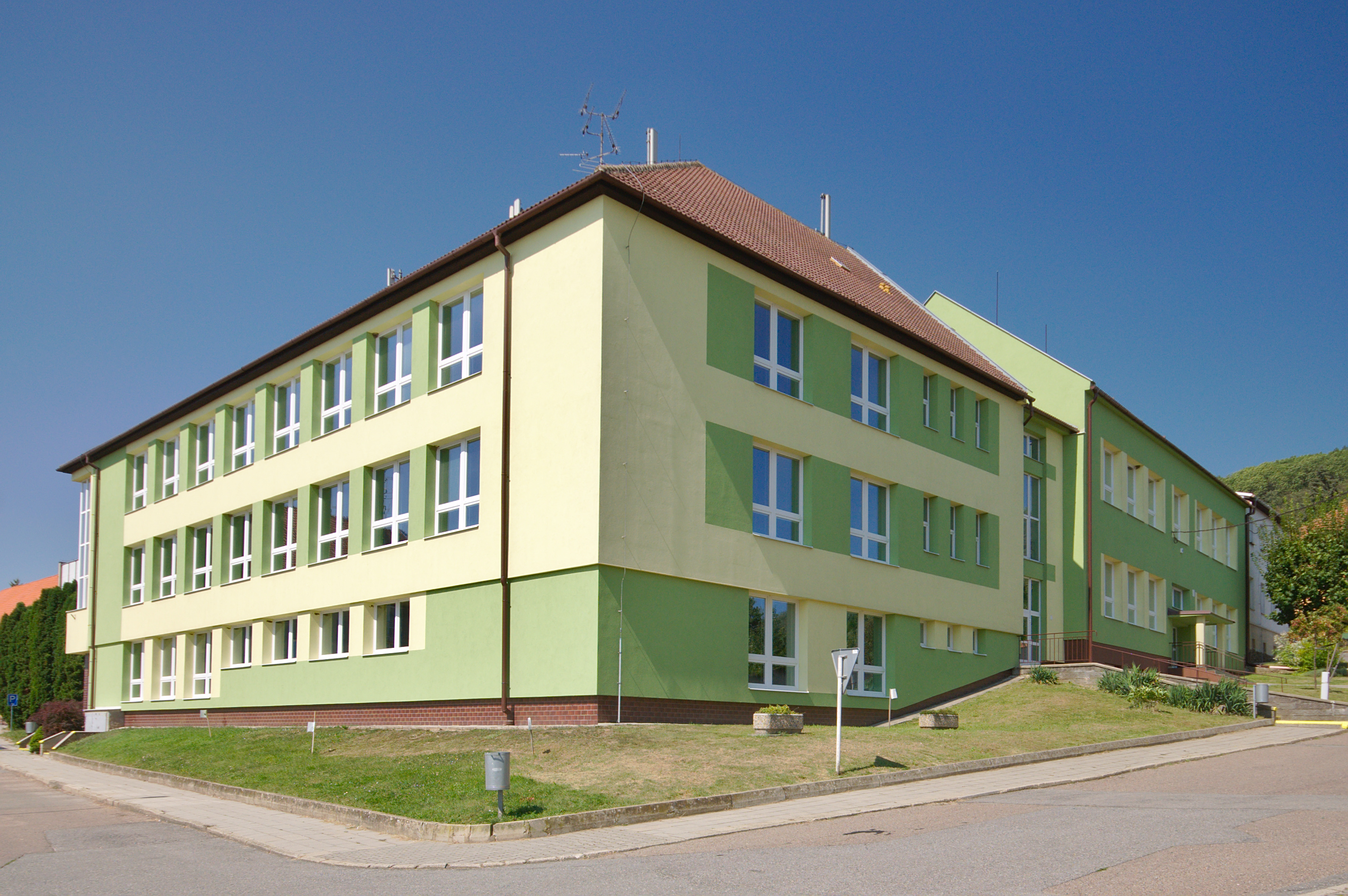 Základní škola, Pustiměř, okres Vyškov